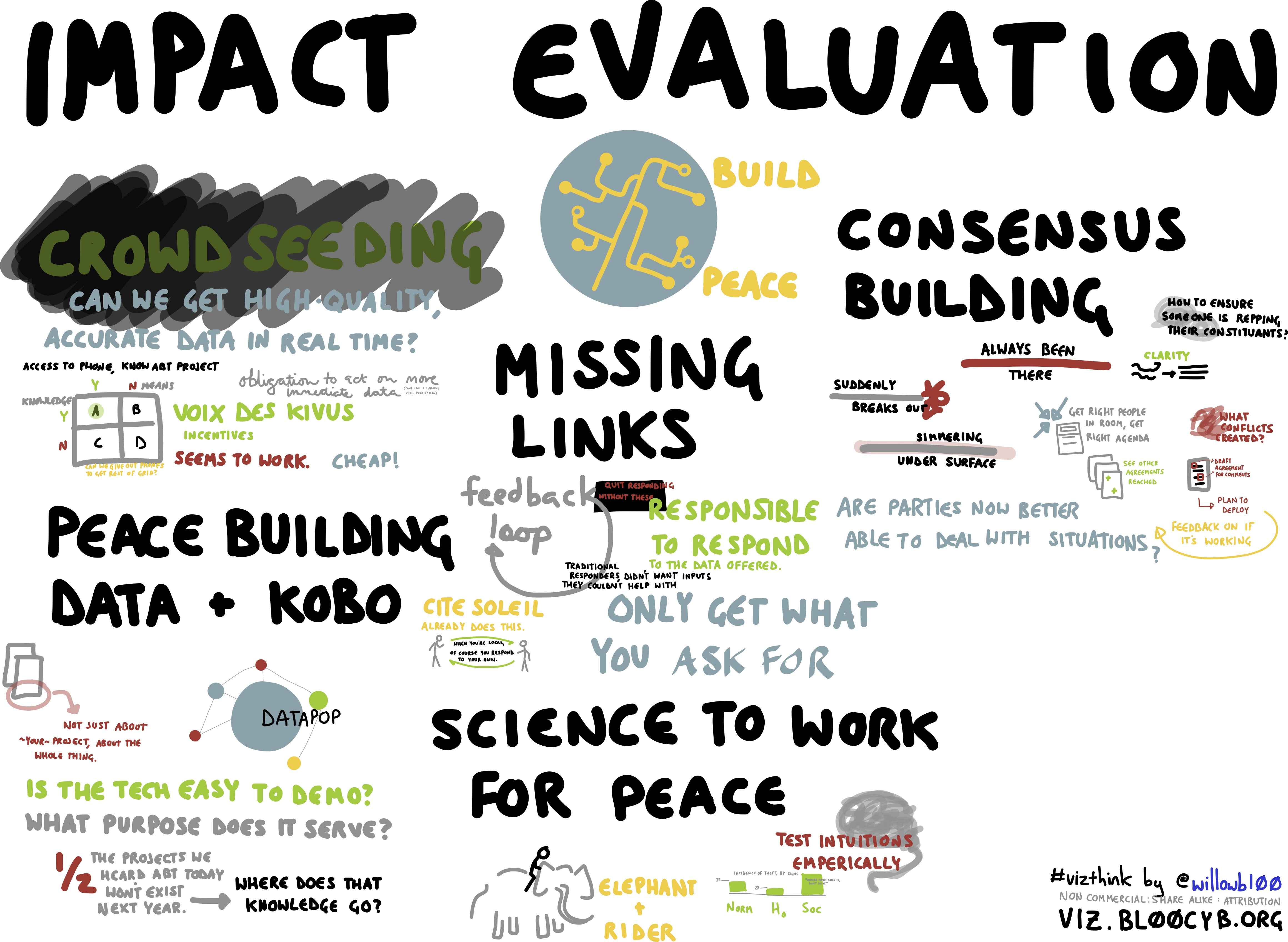 impact evaluation